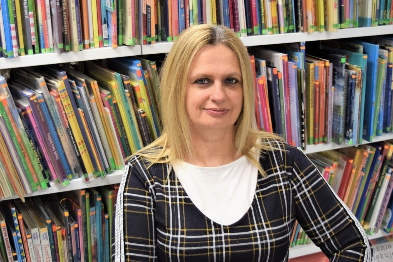 Przasnysz. Dyrektor Miejskiej Biblioteki Publicznej - Małgorzata Sobiesiak